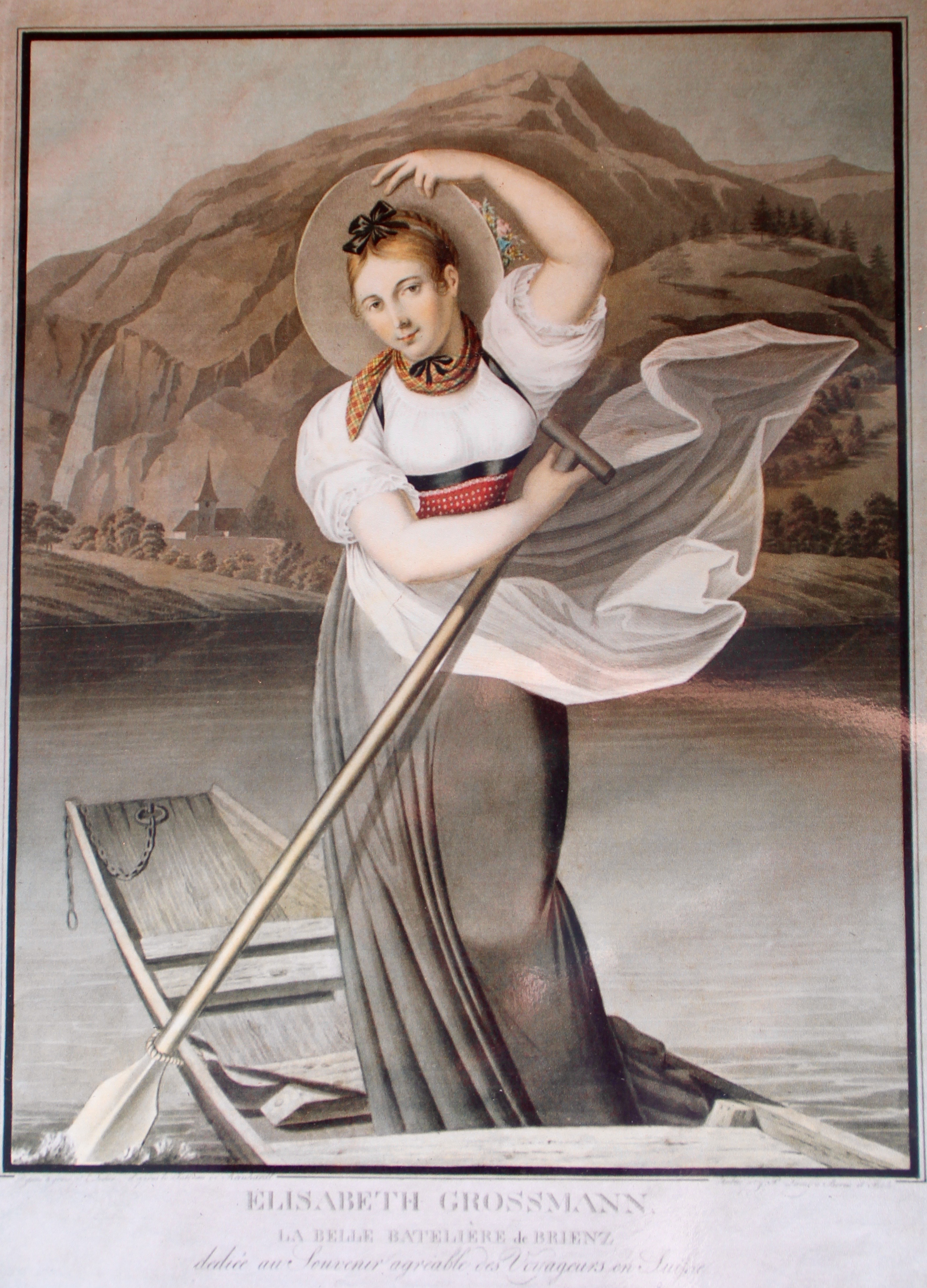 Elisabetha Grossmann um 1815, Aquatinta